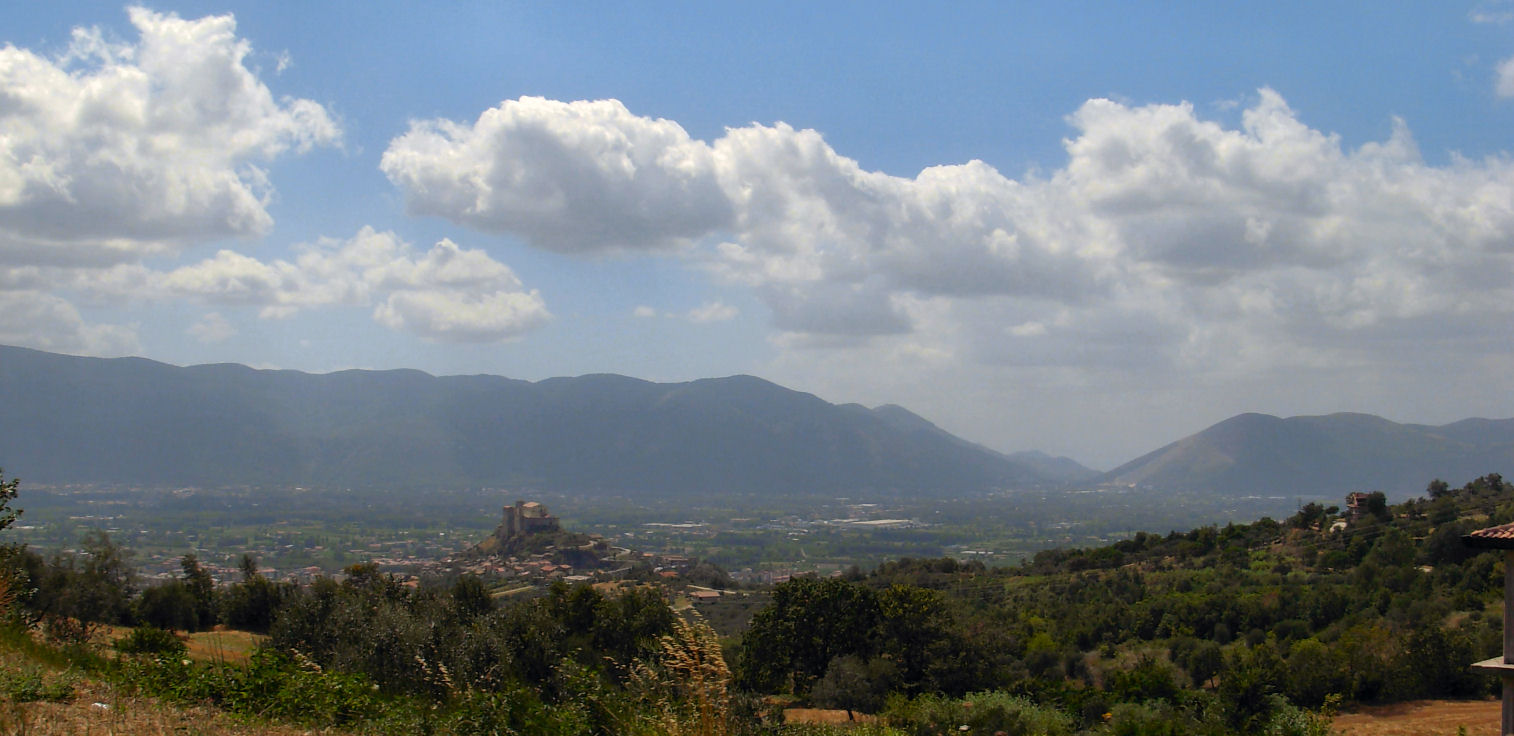 Vista della Valle Caudina (Campania) dalle pendici del Taburno. Sulla sinistra il castello di Montesarchio.